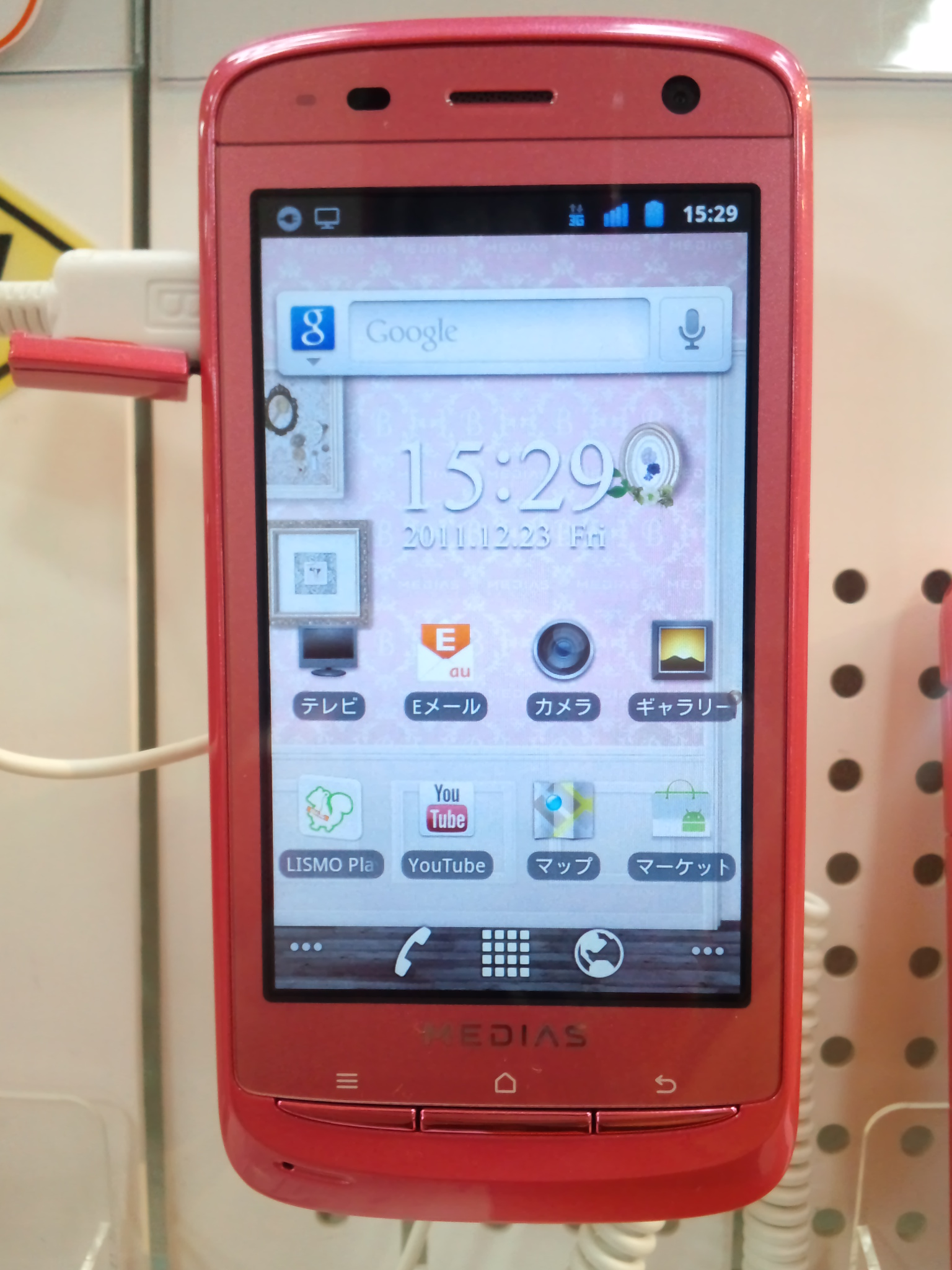 auの携帯電話「MEDIAS BR IS11N」です